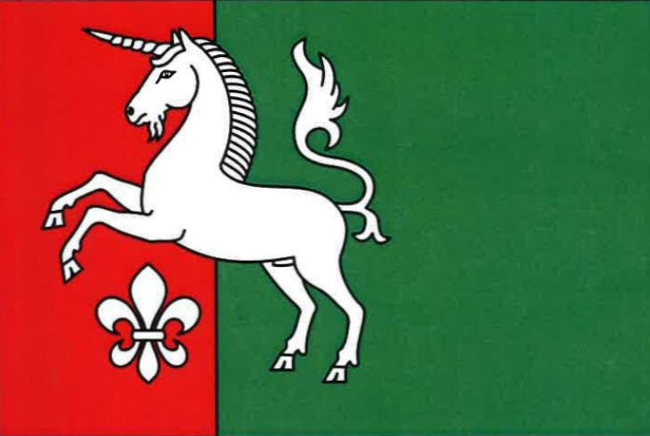 vlajka obce Radenice, okres Žďár nad Sázavou